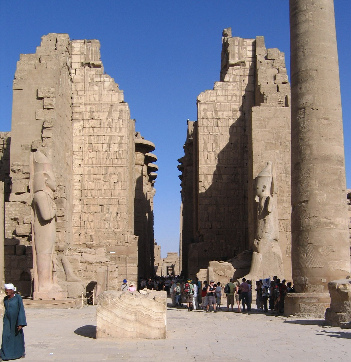 Autoriaus nuotrauka, 2006.04.14. Karnako šventykloje. Nuotrauka gali būti platinama pagal GFDL licenciją.